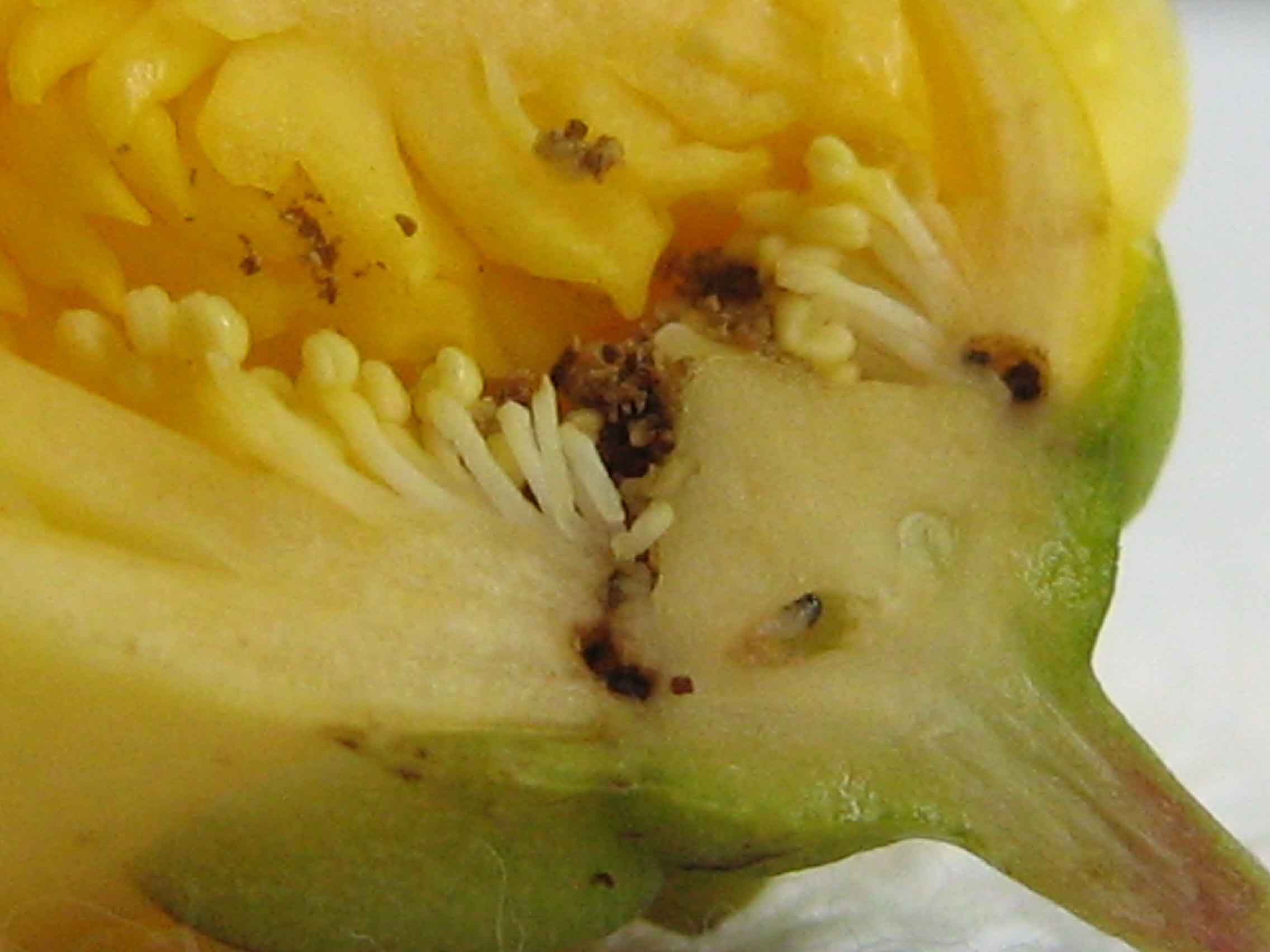 Eschweilera ovata (Cambess.) Miers